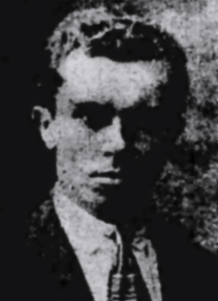 O médico, antropólogo, historiador, jornalista, escritor baiano Thales de Azevedo (1904-1995), em 1926.